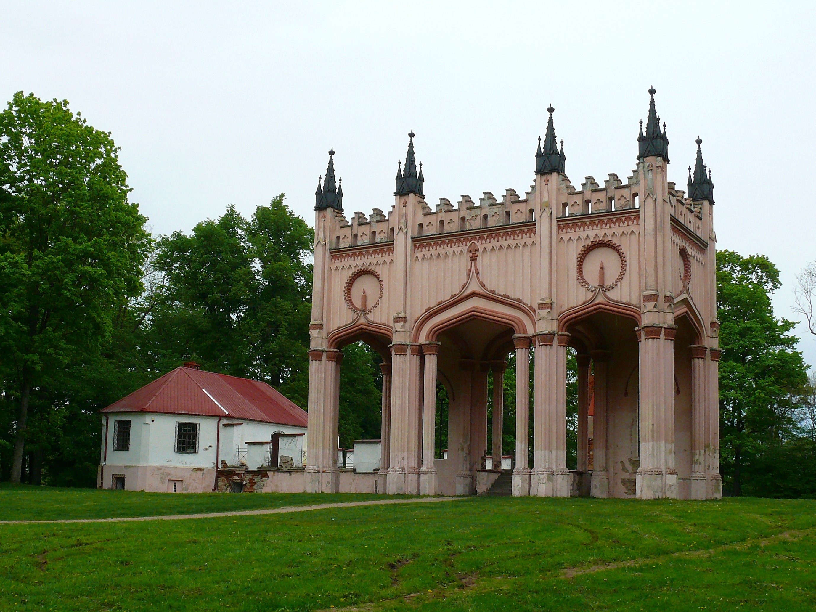 Pałac Paca w Dowspudzie